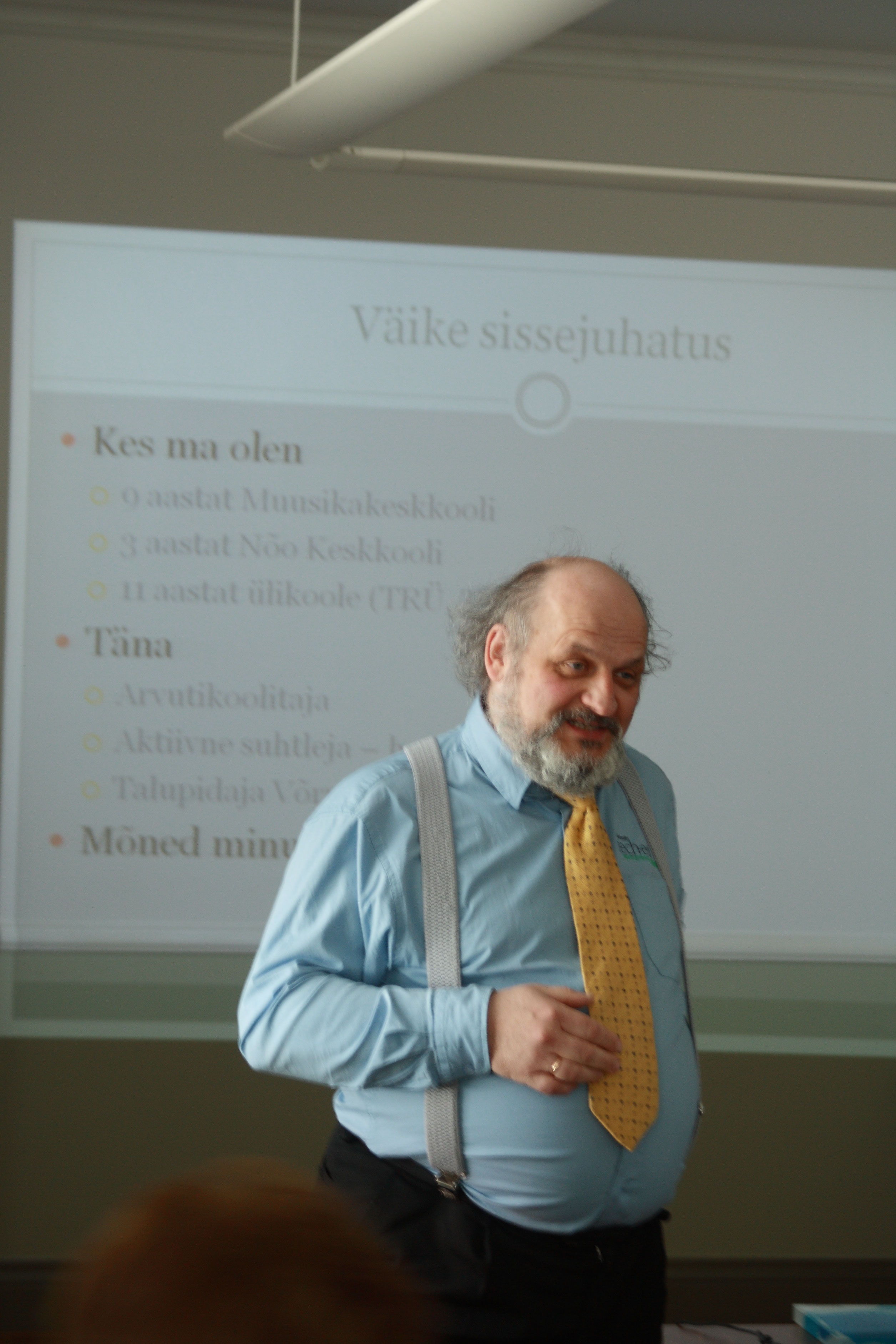 Henn Sarv tutvustamas Eesti Genealoogia Seltsi Saaremaa osakonnale keskkonda